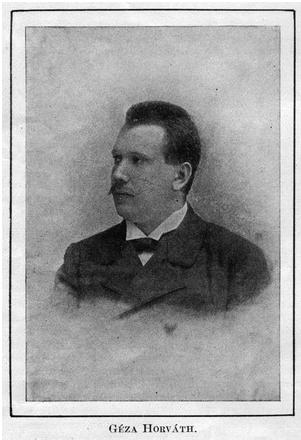 Abbildung des Komponisten Geza Horvath